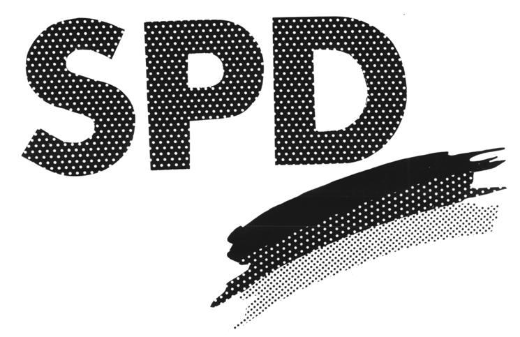 ADN-ZB-Grafik-12.2.90-ros-Berlin: Signet der Sozialdemokratischen Partei Deutschlands (DDR).